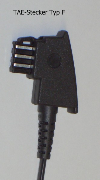 Telekommunikations-Anschluss-Einheit (TAE)-Stecker, Kodiernase für Fernsprecher. (Typ F). Anwendung für Telefone bzw. als Zuleitung zum DSL-Splitter vorgesehen.